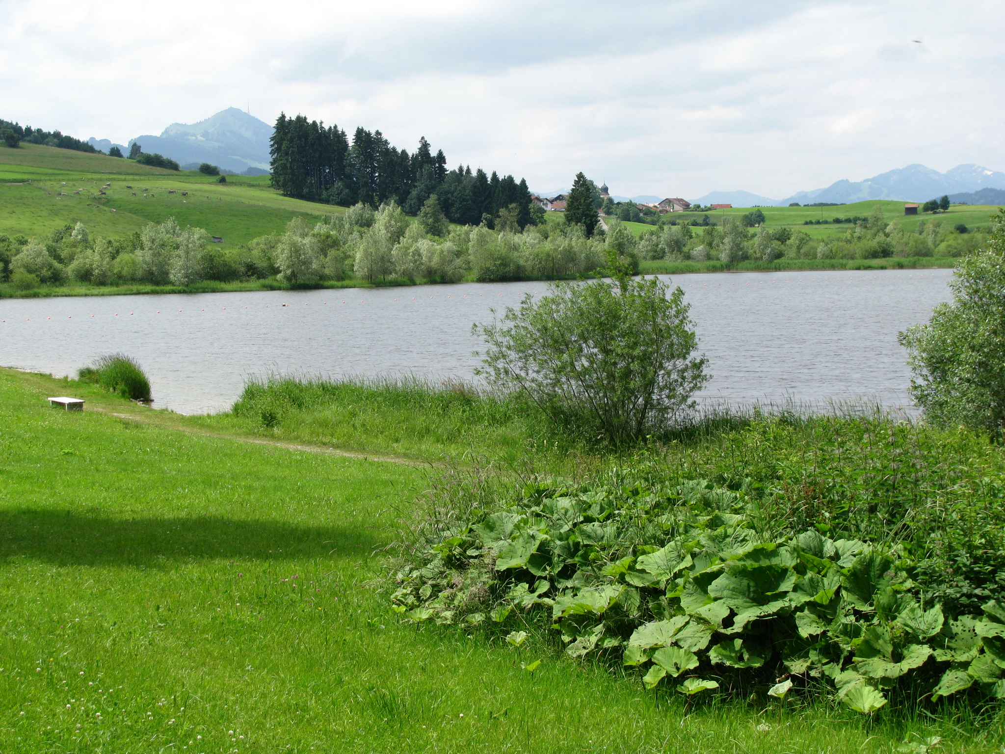 Teilansicht des Rottachsees, Erholungsgelände bei Bisseroy, links im Hintergrund der Grünten